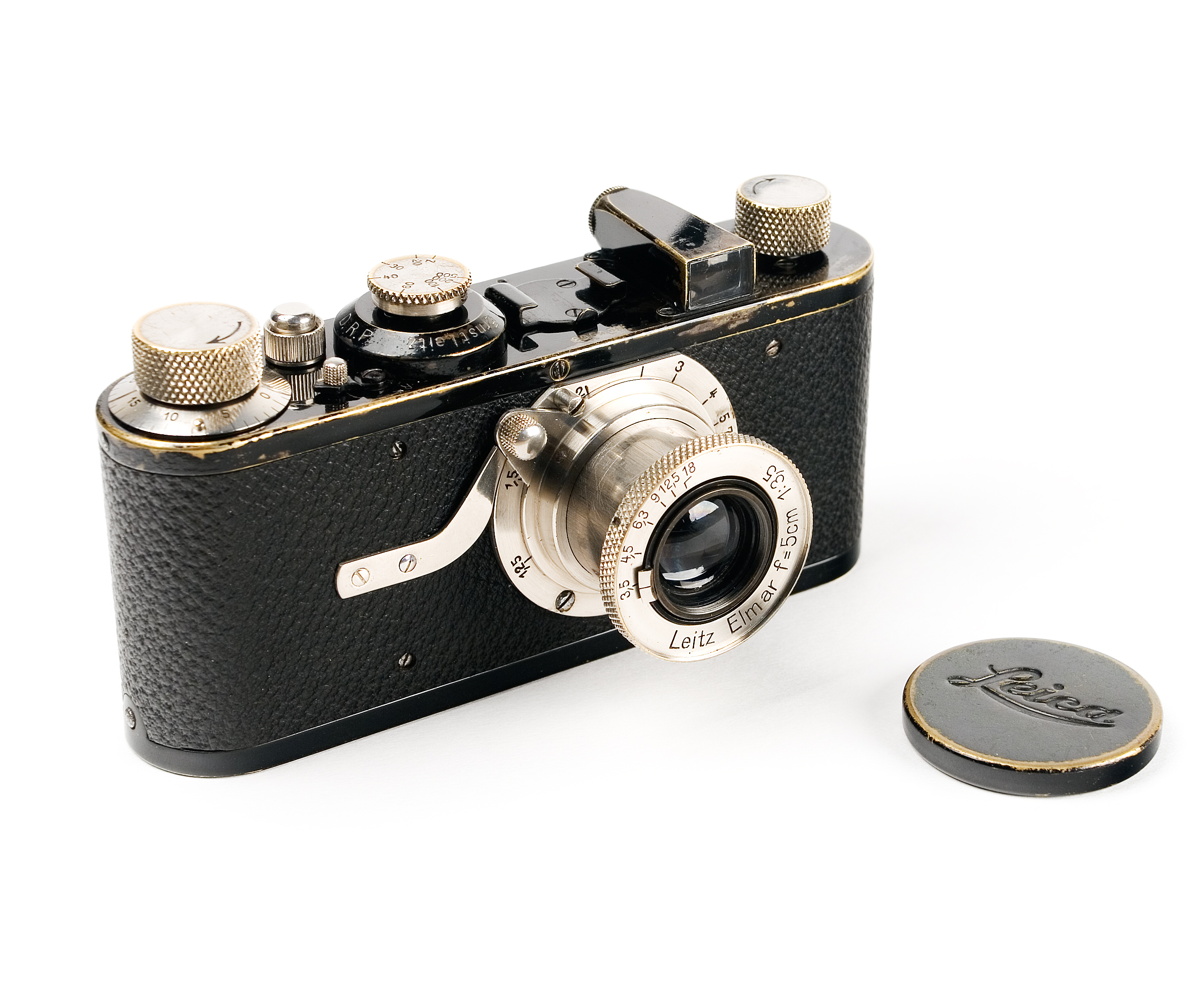 First Leica Camera, model I(A).